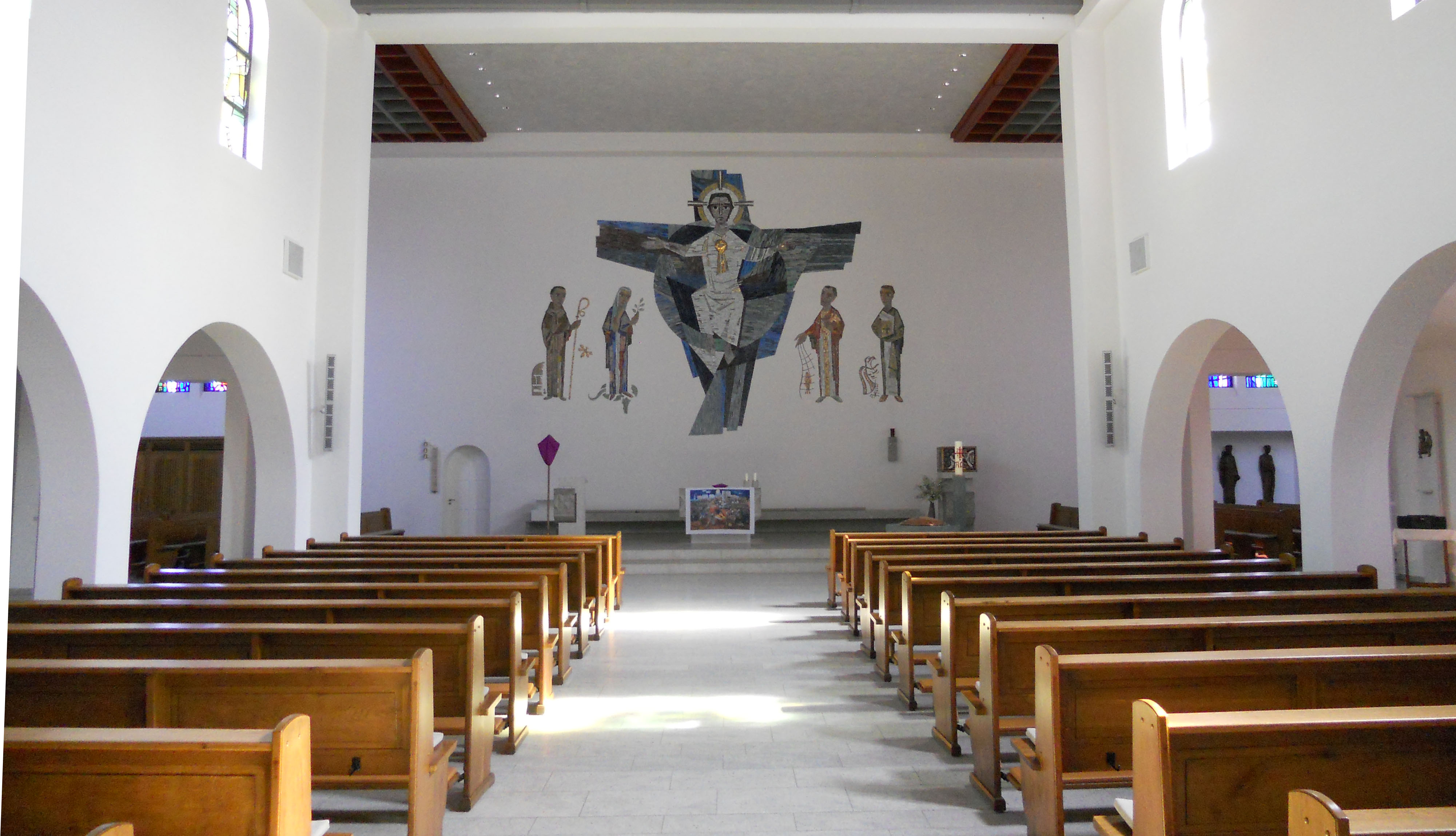 Innenansicht von St. Peter in Werl